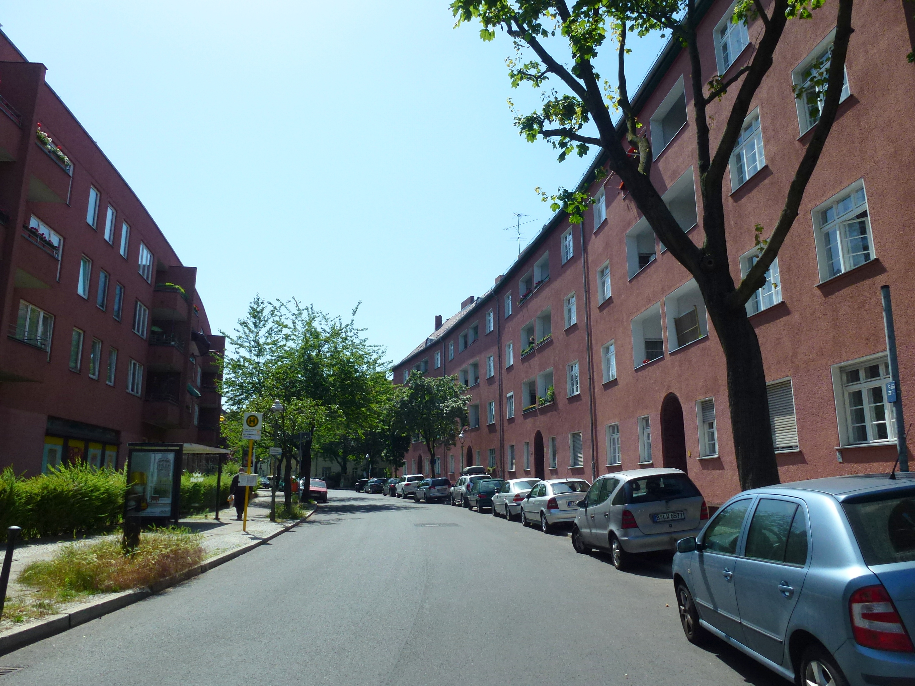 Berlin-Tempelhof Hoeppnerstraße